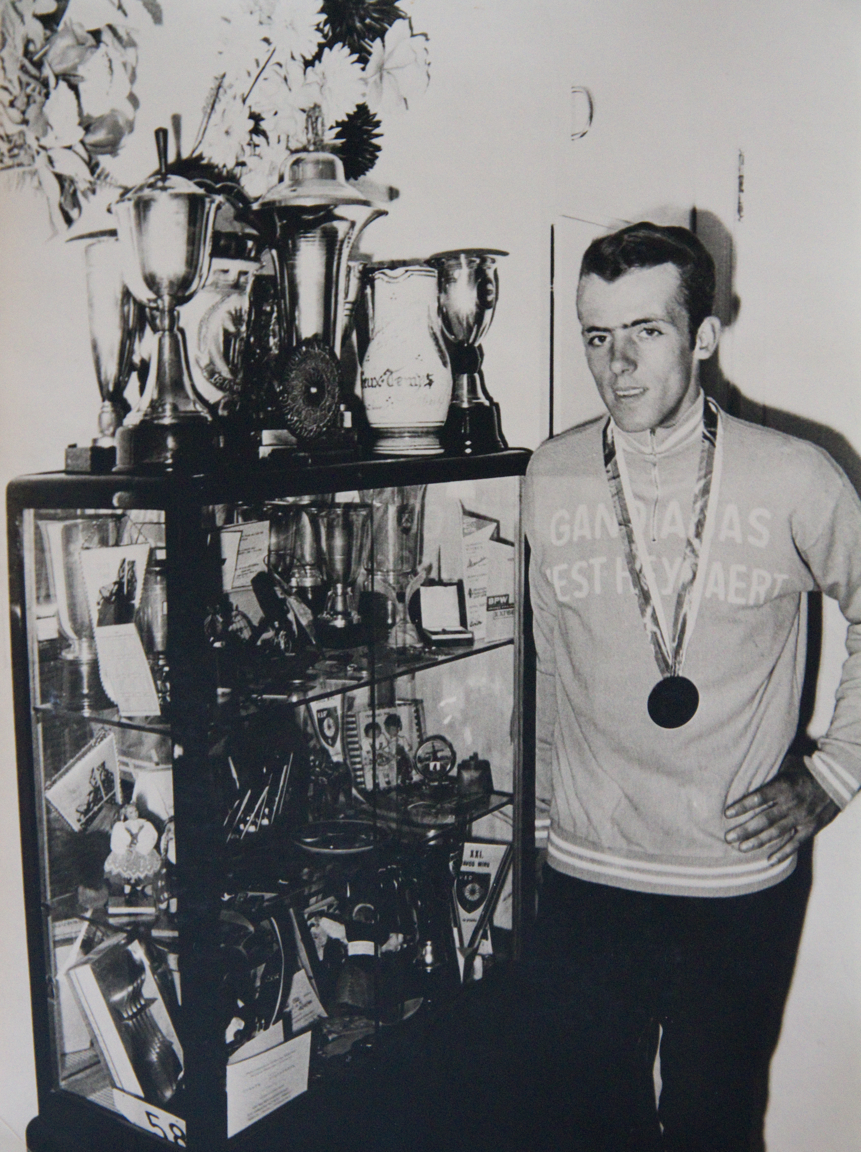 Jos Schoeters en zijn trofeeën/ Jos Schoeters and are trophies.